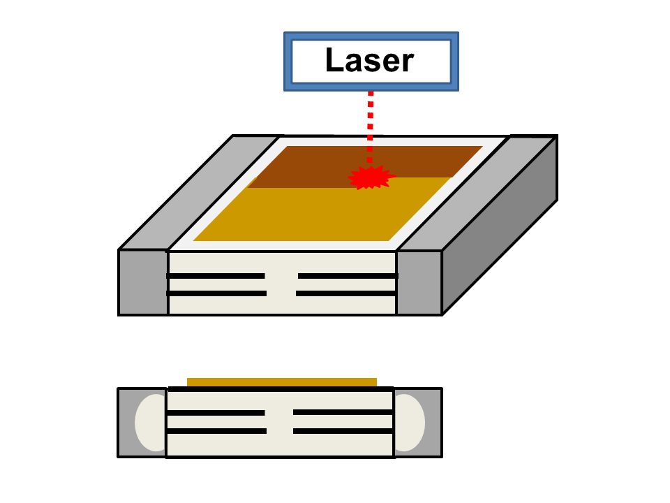 Prinzipielle Darstellung des Einstellens der Kapazität eines Laser-Trimmerkondensators mit Hilfe eines Laserstrahles